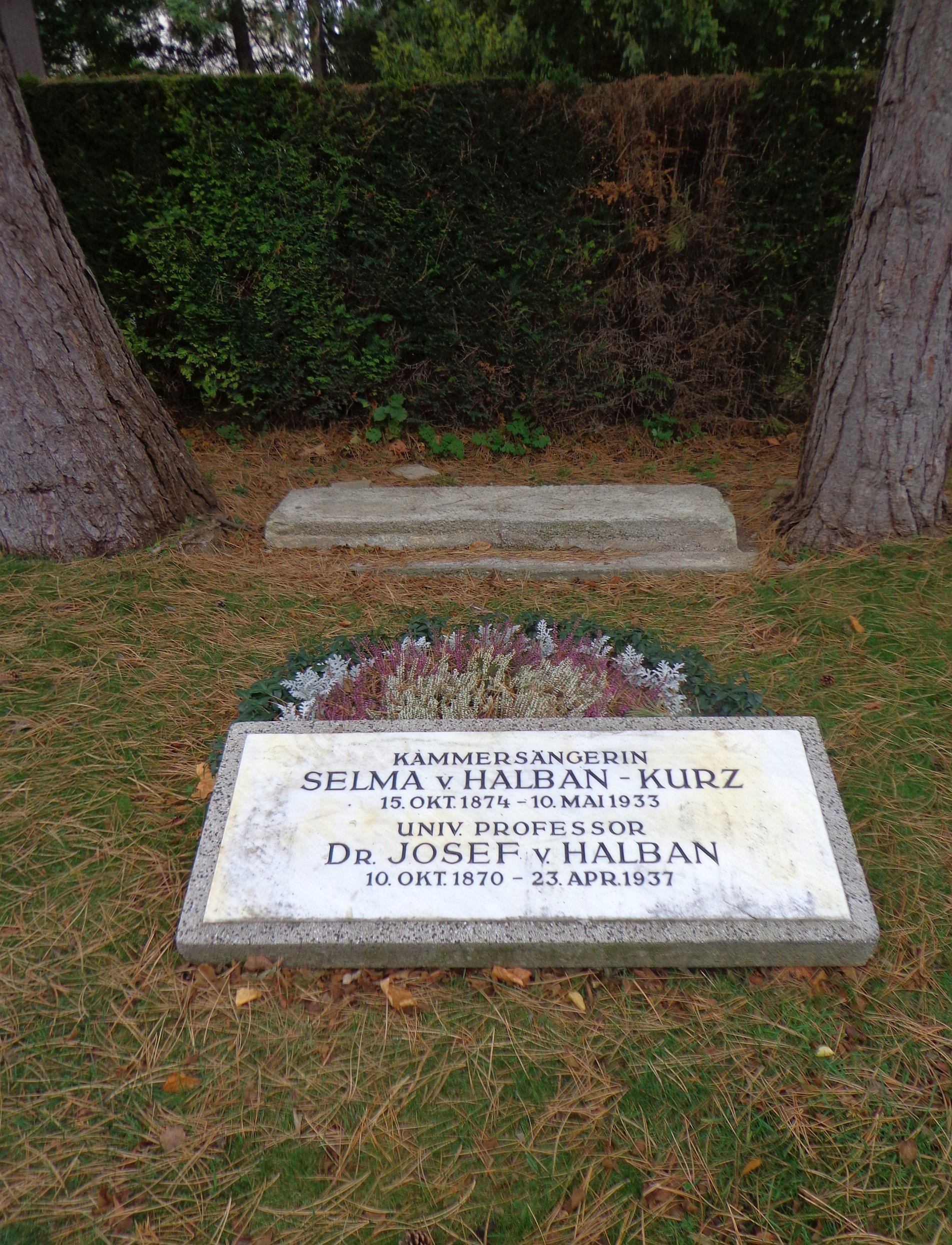 Wiener Zentralfriedhof - Gruppe 14 C, Ehrengrab von Selma Halban-Kurz und Josef von Halban